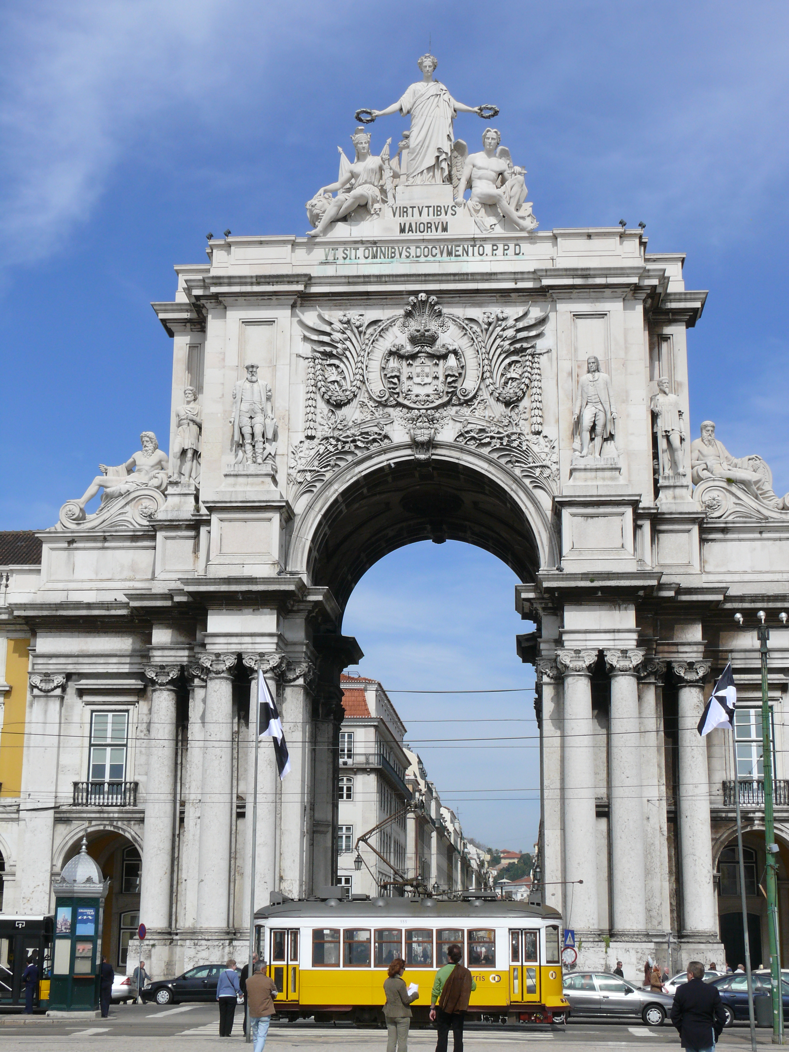 Inicio da Baixa Pombalina a partir do Arco da Rua Augusta